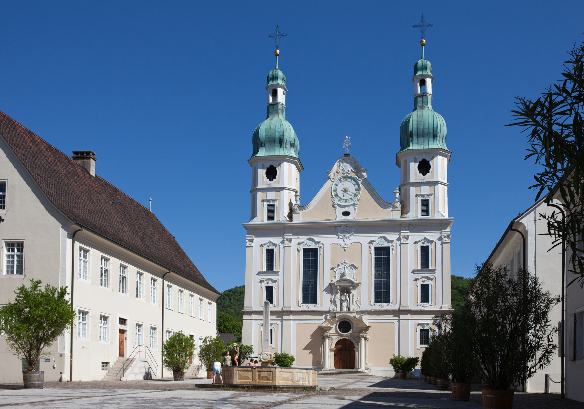 Domplatz mit Dom und Domherrenhäuser